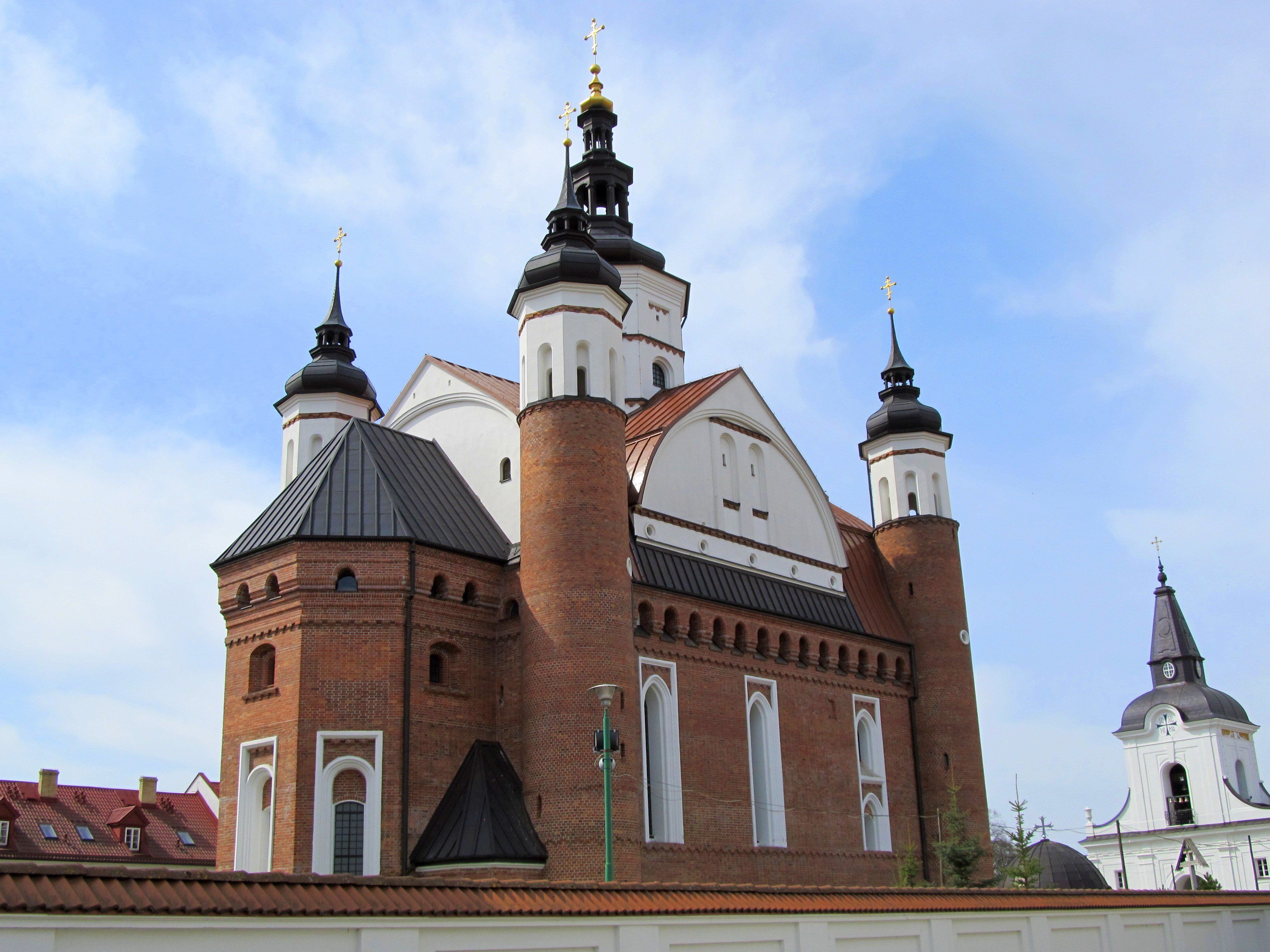 Supraśl, ruiny cerkwi p.w. Zwiastowania NMP, 1503-1511; po 1984